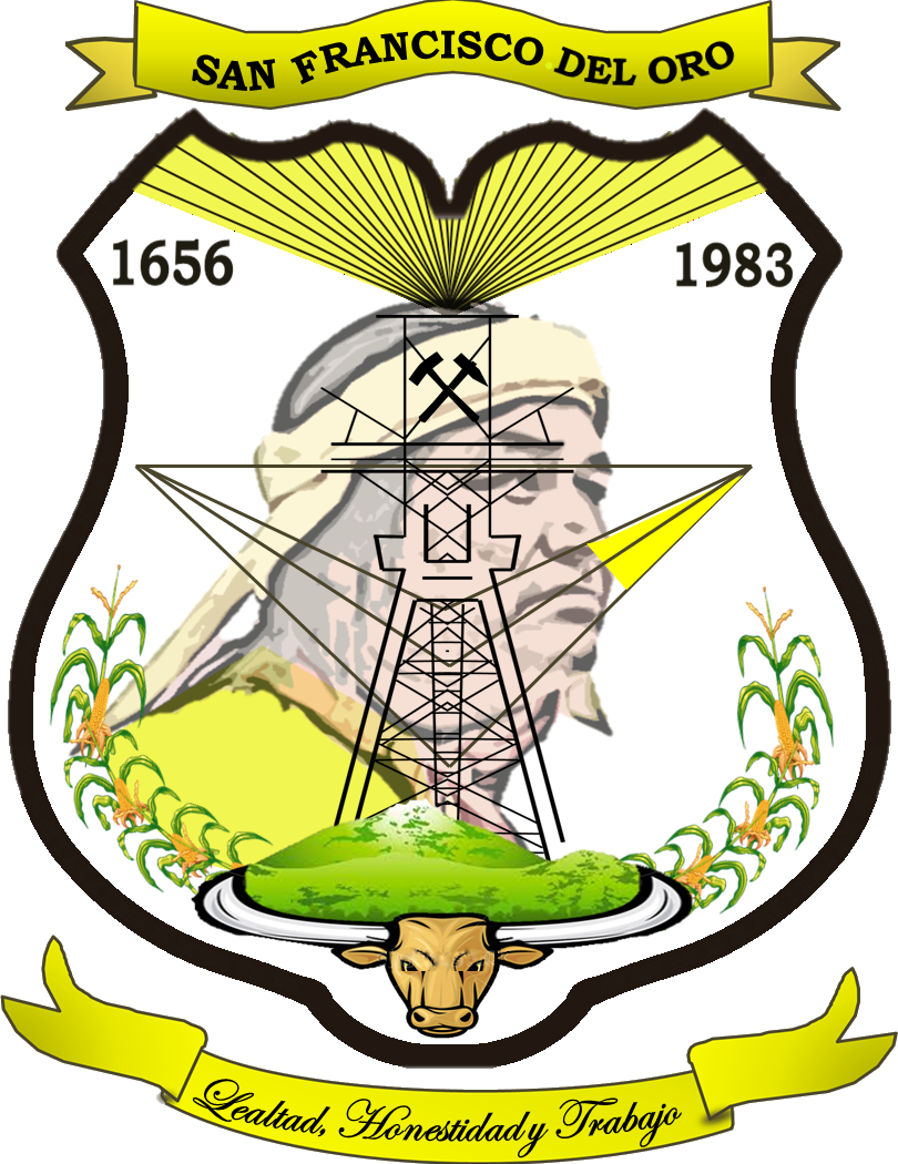 Escudo de San Francisco del Oro. El escudo oficial del municipio, está resuelto en un campo muy estilizado, que en algo nos recuerda el campo español; sus blasones son los siguientes: 1. - Silueta del indígena Francisco Molina, descubridor del mineral en el año de 1656. 2. - Rayos solares que significan, iluminación y educación. 3. - Montañas típicas del lugar. 4.- Templo sobre castillo, hace alusión a una religión bien cimentada. 5. - Casco minero, seguridad laboral y pública. 6. - Las canastillas transportadoras del metal, que dependen de la orilla del casco, representan en sí a las dos principales minas; que son Francisco y Clarines, de la Compañía Minera Frisco. 7. - Principales vías de comunicación terrestre, carretera y ferrocarril. 8. - Cabeza de ganado vacuno, simboliza la ganadería regional. 9. - Matas de maíz como símbolo agrícola, cada hoja representa a una comunidad del municipio. 10. - El lema es: UNIDAD, HOSPITALIDAD Y TRABAJO